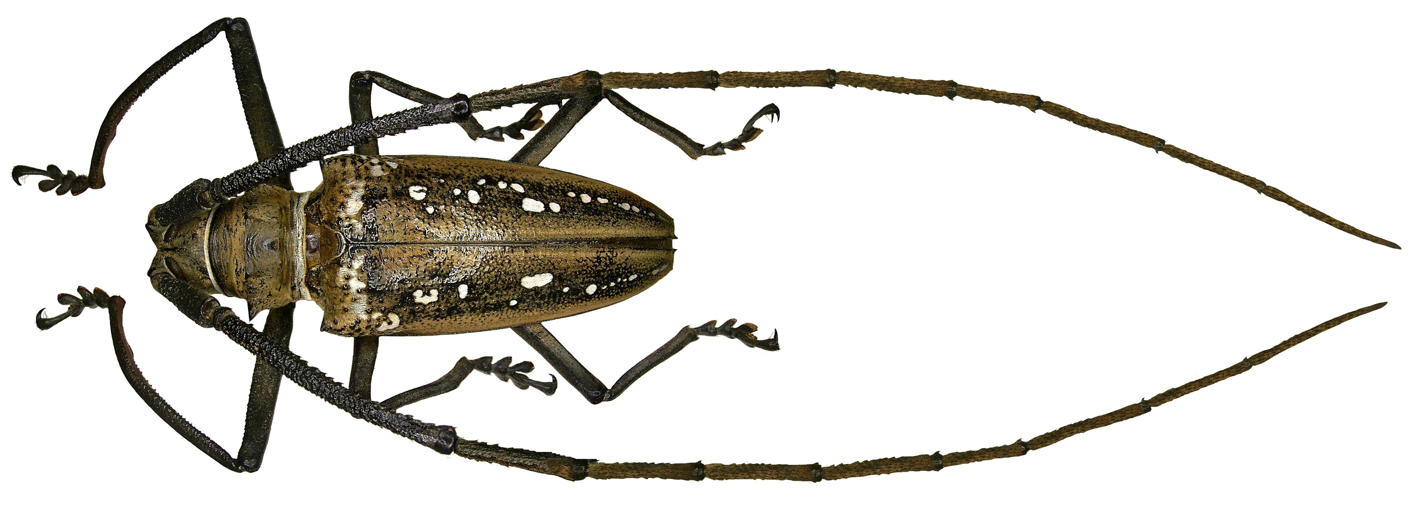 Familie: Cerambycidae Größe: 43-82 mm Vorkommen: Neuguinea, Aru Island, Key Island, Horn Island, Cape York Fundort: Indonesien, Irian Jaya, Batanta-Island leg.det. A.Skale, 2004 Foto: U.Schmidt, 2008